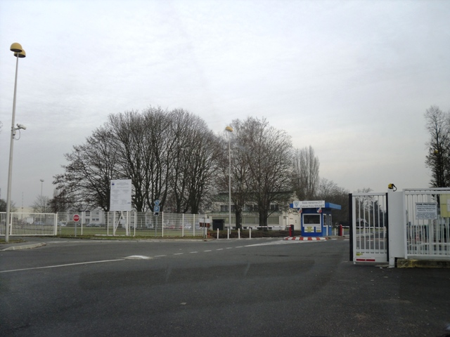 L'entrée de la base aérienne 217 Brétigny-sur-Orge (91)